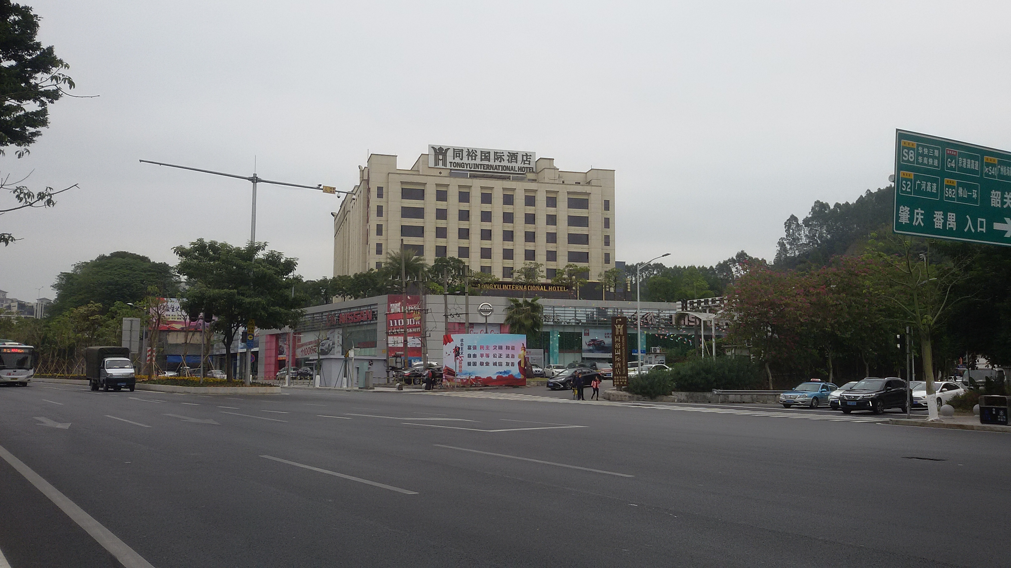 粵語: 同裕國際酒店